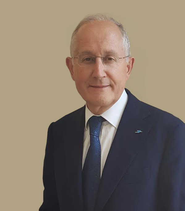 Philippe Wahl au siège du Groupe La Poste